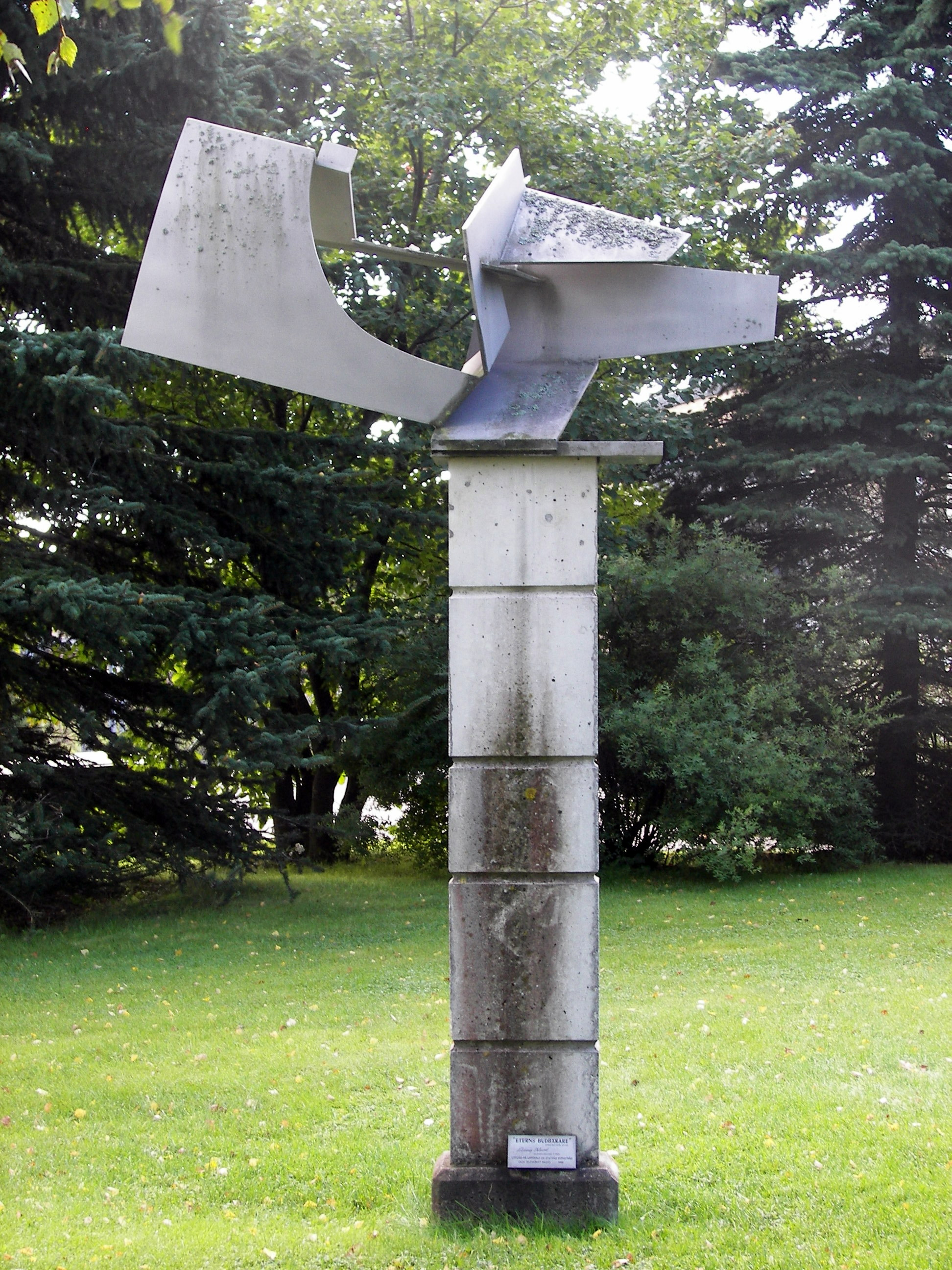 Eterns budbärare av Hilding Eklund, konstverk utanför Telias kontorshus i Östra Birsta, Ljustadalen.